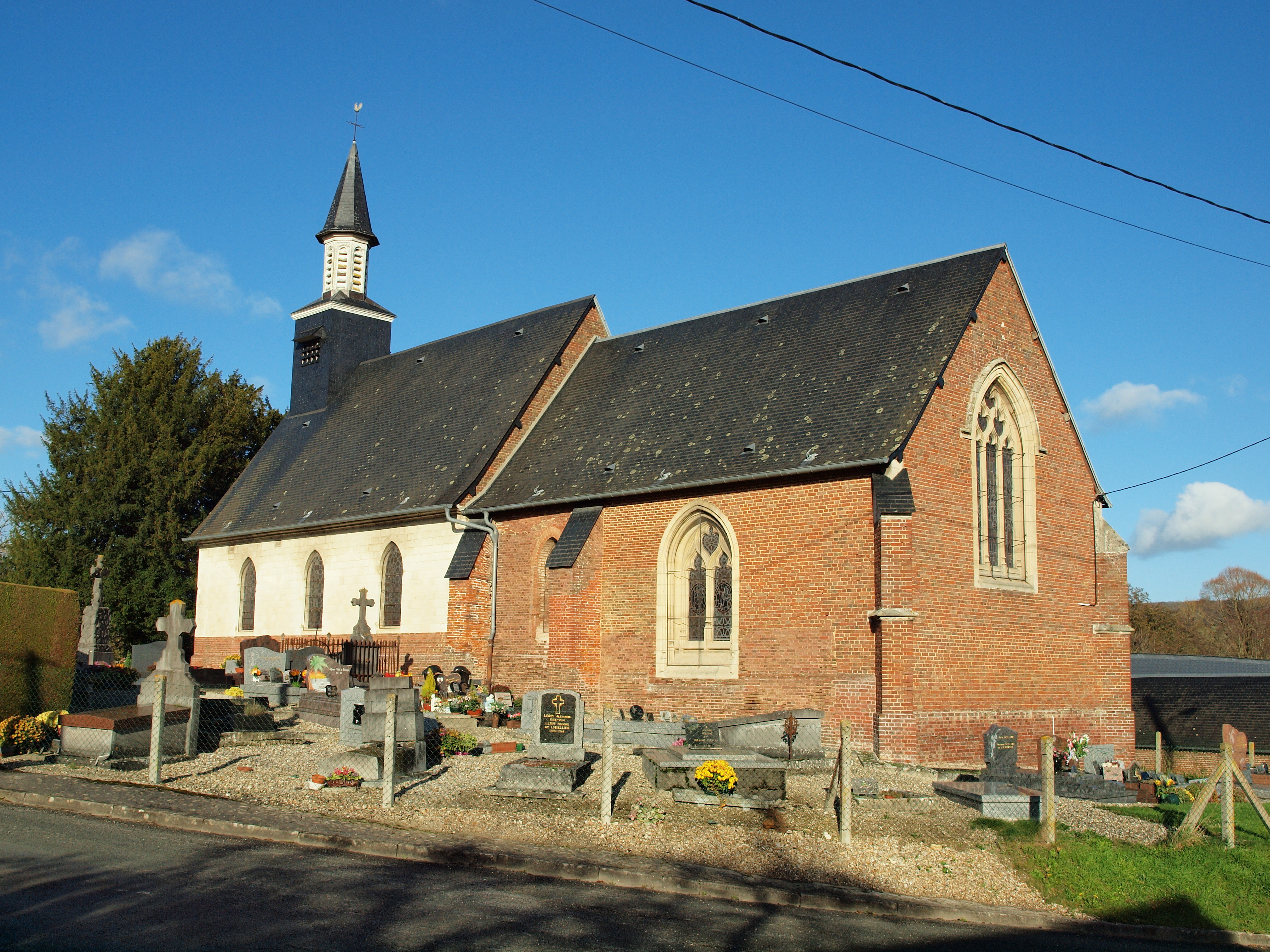 Guimerville (Seine Maritime, France)